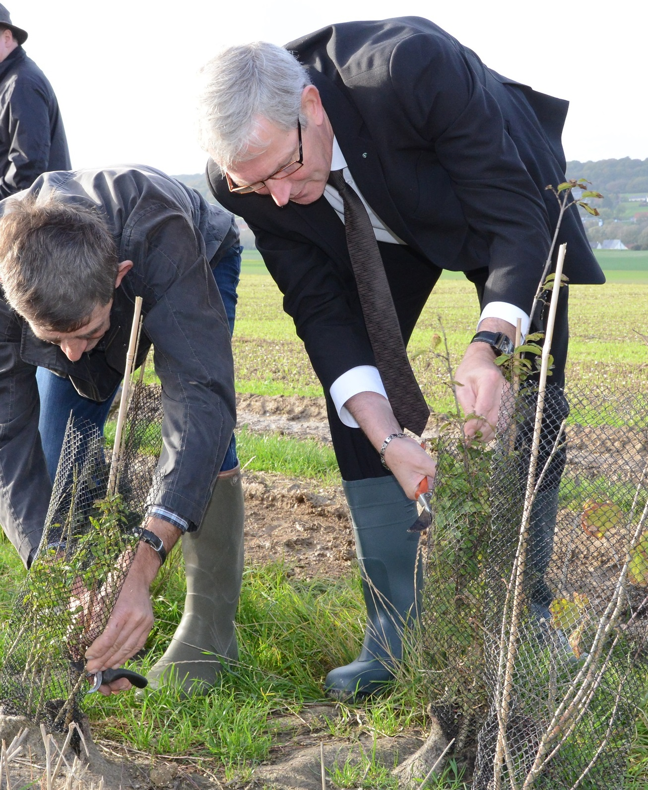 Michel Dagbert lors de travaux de lutte contre les inondations sur la Vallée de la Hem